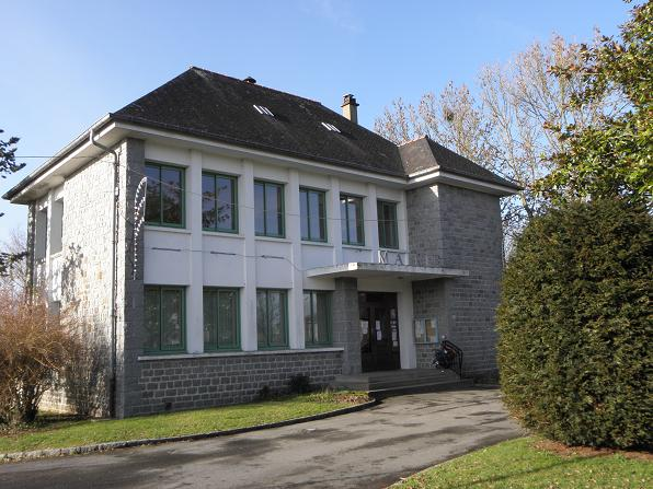 Mairie du Ferré (35).